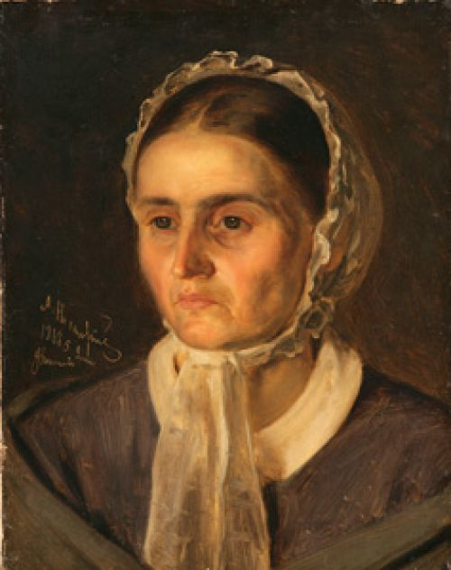 Музей: Нацыянальны мастацкі музей Рэспублікі Беларусь Тып: выяўленчыя крыніцы Від: жывапіс Прадметнае імя: жывапіс Назва/аўтарская назва: Партрэт маці Аўтары: Гараўскі Апалінарый Гілярыевіч; Матэрыялы: палатно; Тэхналогіі стварэння: алей; Дата стварэння: 1868 г. Памеры: 41,3х 3341,3х 33